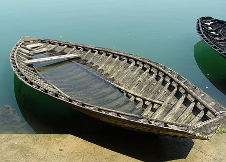 Neretvanska lađa